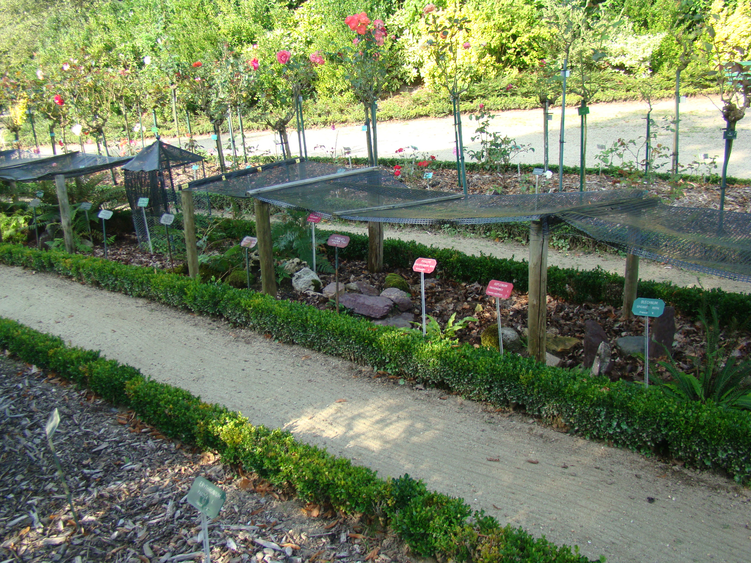 Plantes de sous-bois protégées du soleil par un filet au jardin botanique du Thabor.